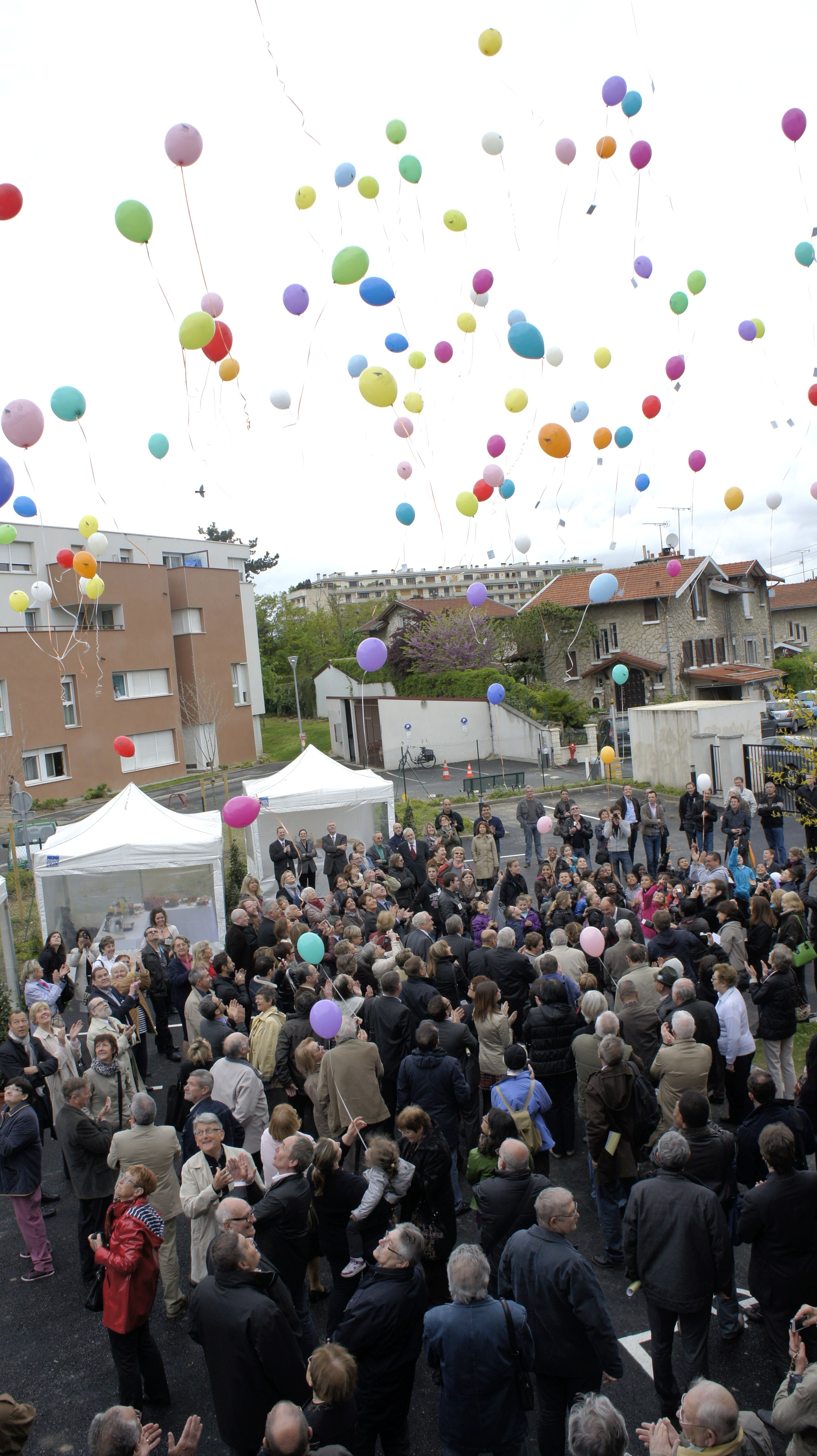 Inauguration du bâtiment du Secours populaire de Reims, Hazan, Bachy, Lauprêtre.. .